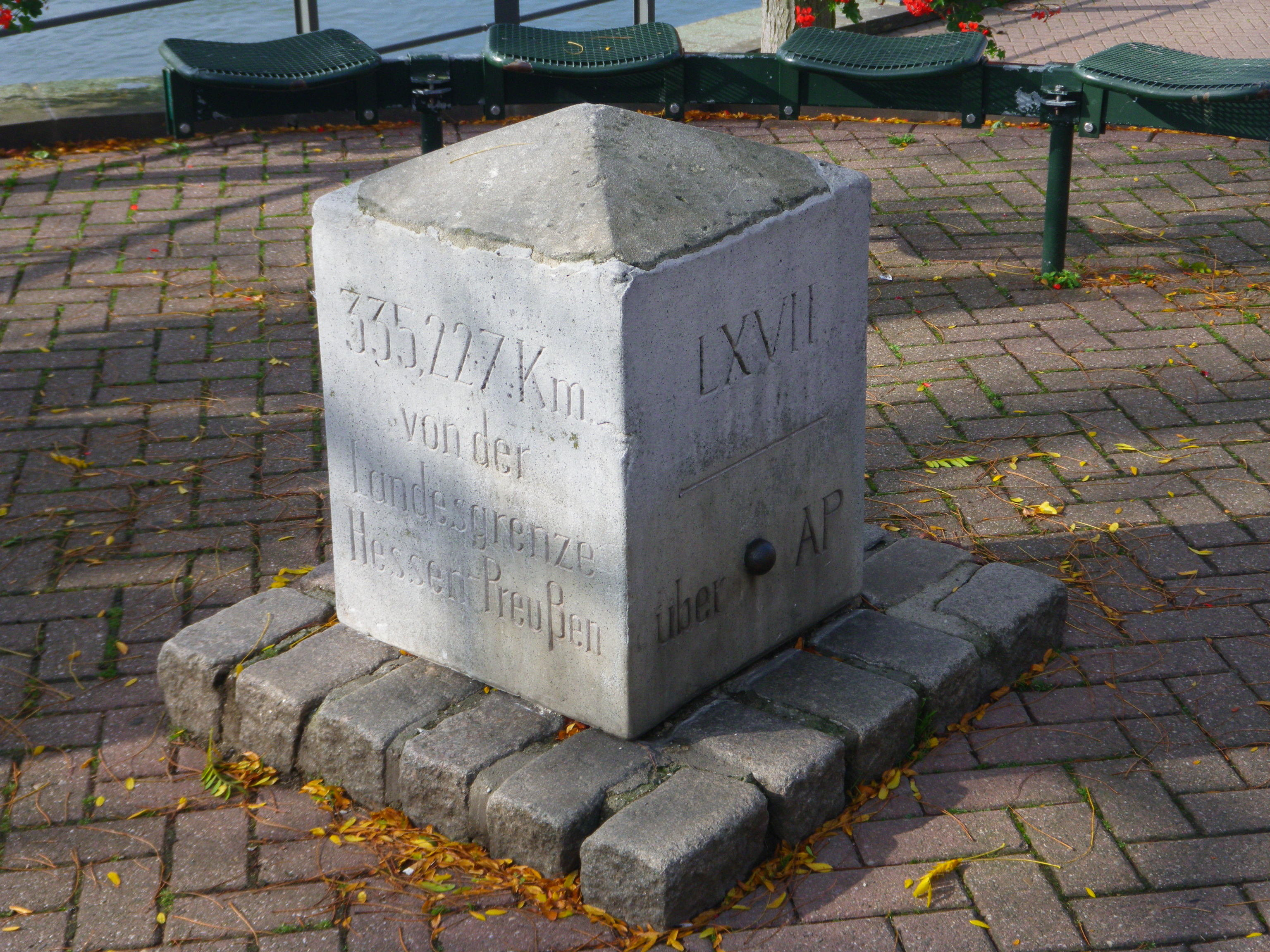 Ortslage: Rees, Rheinpromende Myriameterstein